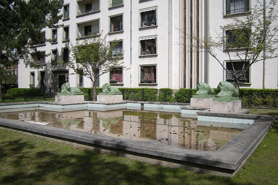 Square des frères Farman à Boulogne-Billancourt, lions initialement réalisés pour la fontaine de l'Institut à Paris